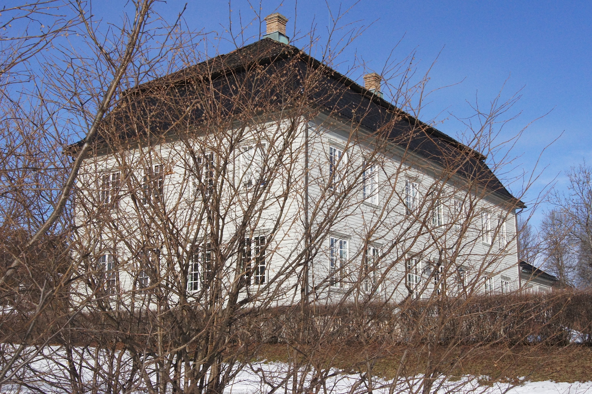 Torderød Gård, Jeløy, Moss